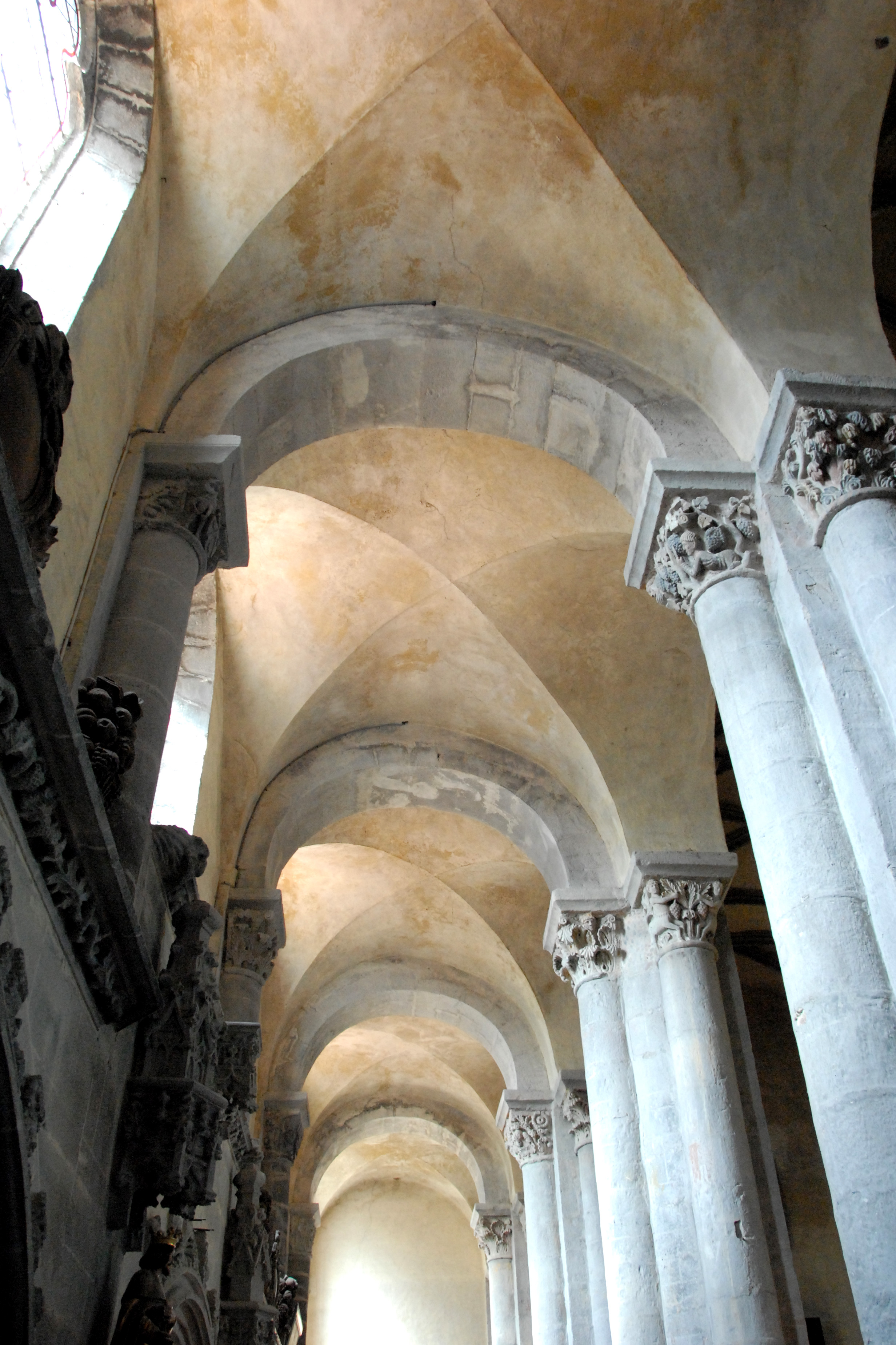 Mozac, Kreuzgratgewölbe, Gurtbogen, südl. Seitenschiff